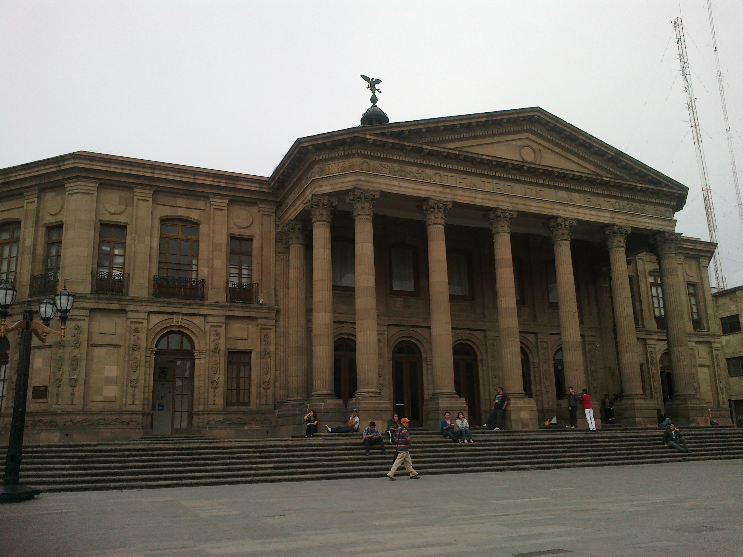 Vista frontal.